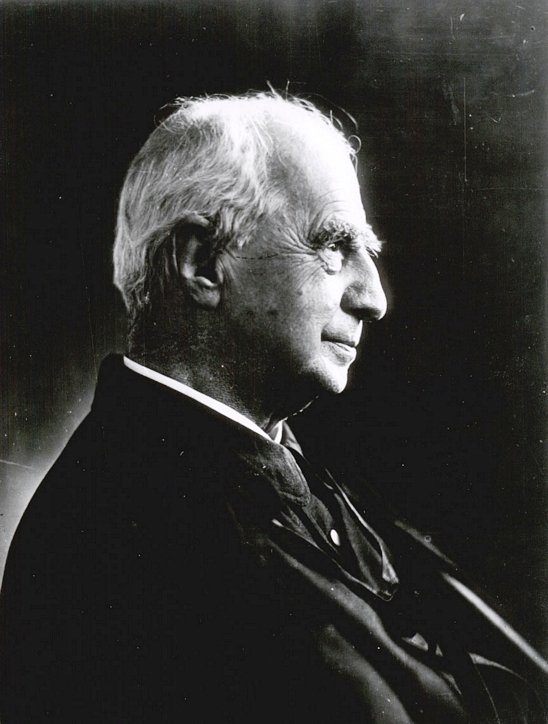 Monseñor Crescente José de los Dolores de María Santísima Errázuriz Valdivieso ( * Santiago, Chile, 28 de noviembre de 1839 - † ibídem, 5 de junio de 1931), religioso chileno, Arzobispo de Santiago.